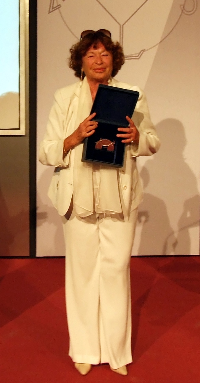 Inge Schönthal-Feltrinelli bekommt die Karlsmedaille für europäische Medien verliehen.